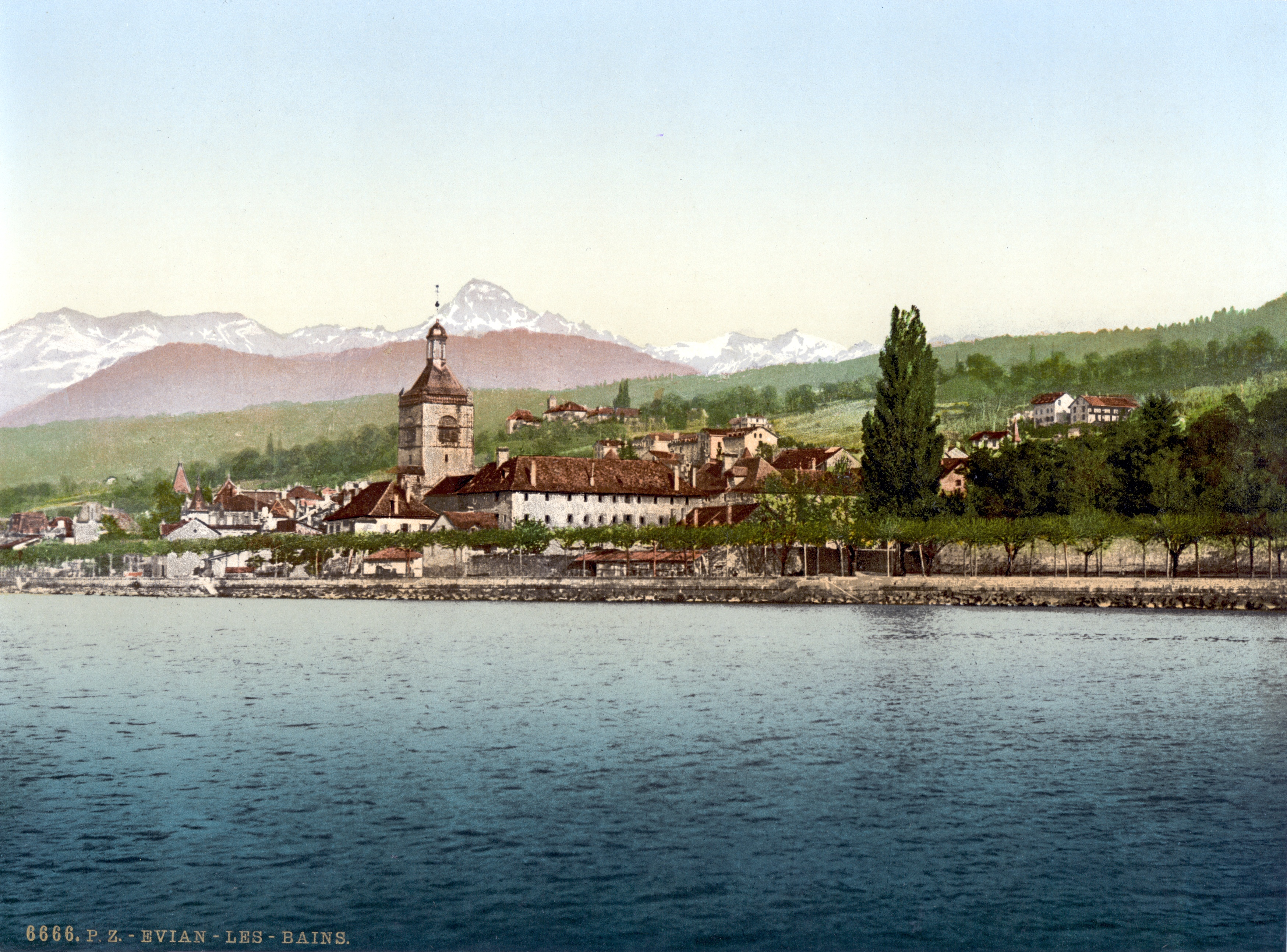 Evian-les-Bains, France.